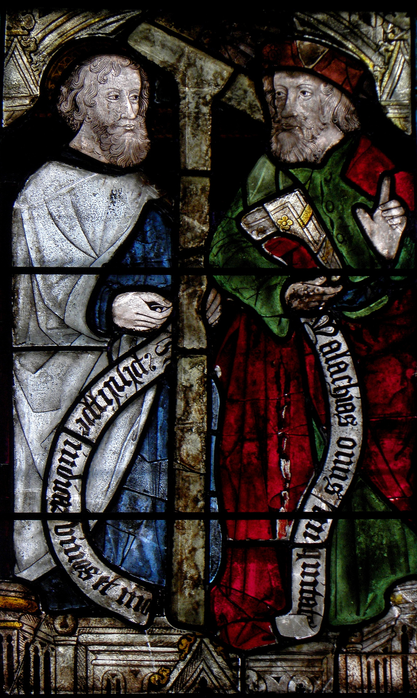 Baie 05 de la chapelle Notre-Dame de Kergoat en Quéménéven (29).